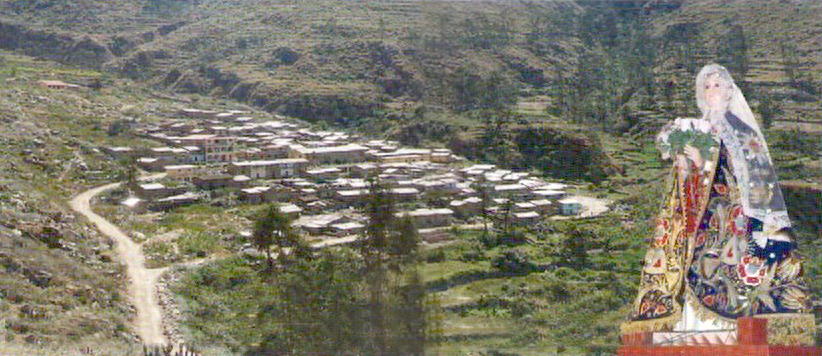 Vista panorámica del Pueblo de Pimachi.Ancash